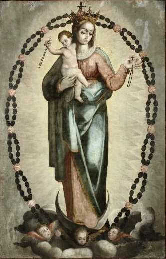 La obra representa a la Virgen María llevando en brazos a su hijo, el Niño Jesús.